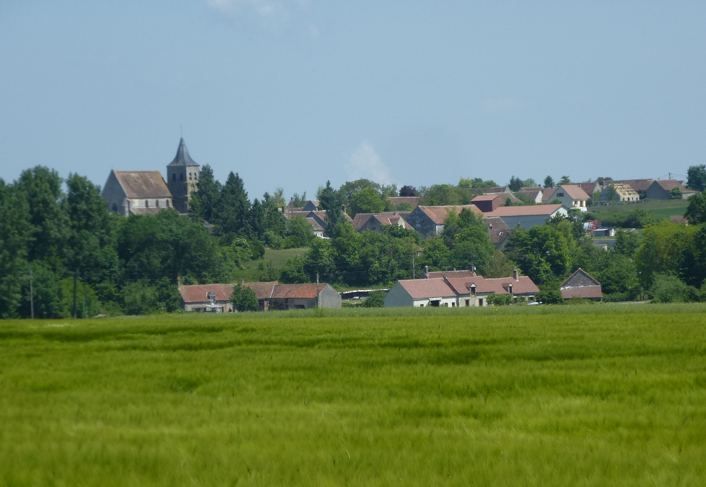 Village de Villenauxe-la-Petite. (département de la Seine-et-Marne, région Île-de-France).